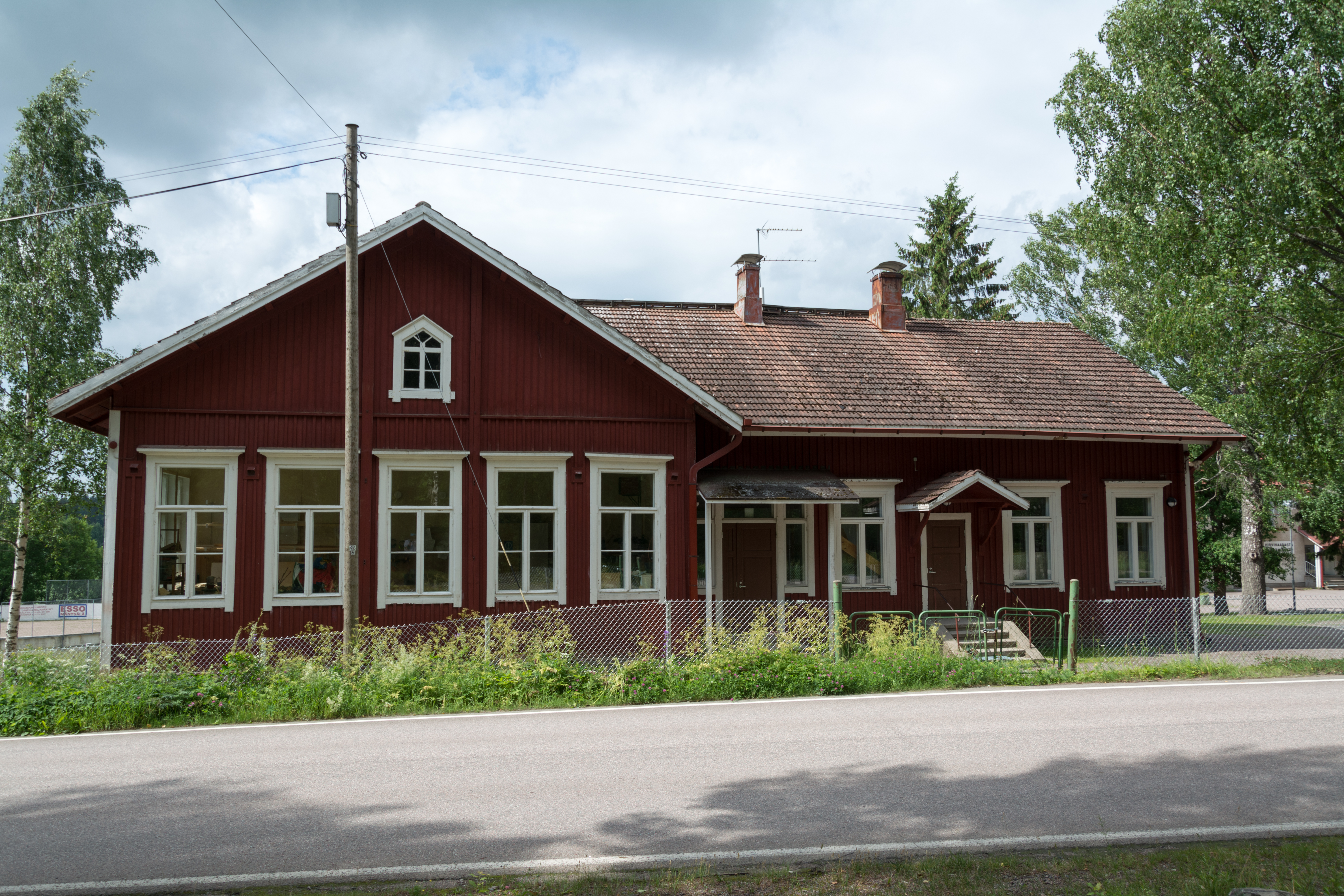 Hirvihaaran koulun puurakennus